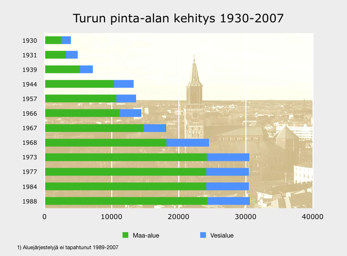 Turun pinta-alan kehitys 1930-2007